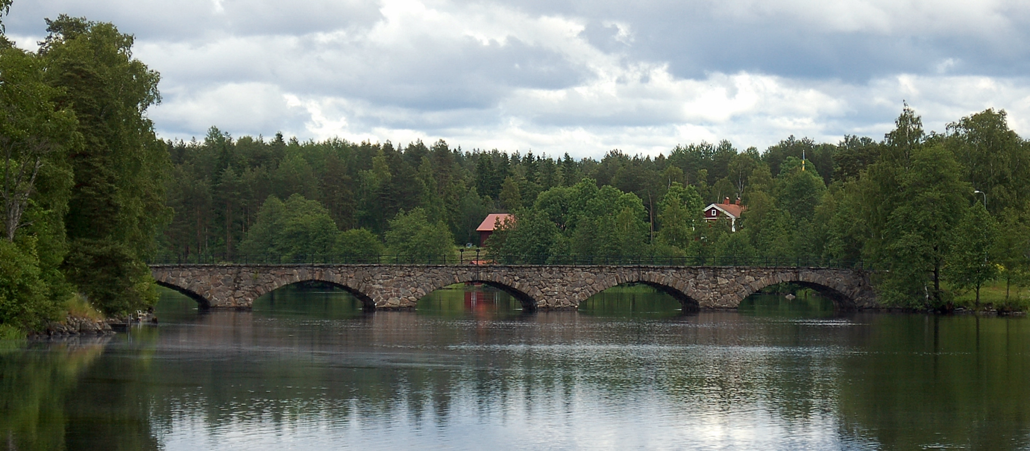 Stenbro över Letälven i Åtorp. På två skylar anges texten "GRÄNS IMELLAN öREBRO OCH CARLSTADS LÄN" respektive "MDCCCXVII"